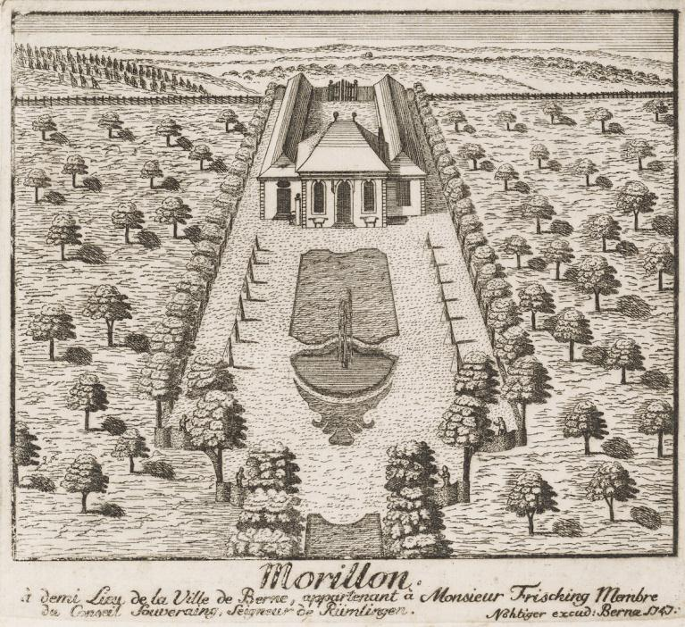 Campagne Morillon, um 1740. (Vorgängerbau der Villa Morillon)